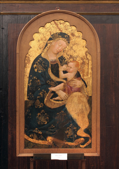 Madonna del Latte, retable de